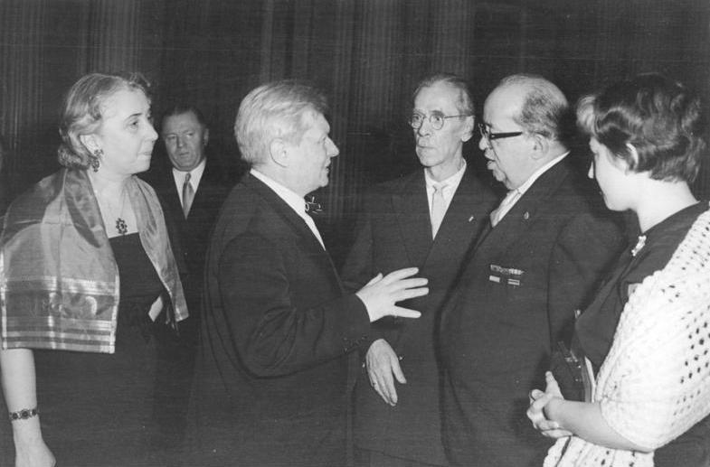 Berliner Festtage, Eröffnung, Ebert, Nagel Zentralbild Ulmer 15.11.1958 Berliner Festtage 1958 feierlich eröffnet Mit einer eindrucksvollen Festveranstaltung wurden am 15.11.1958, des Vortages der Volkswahlen, in der Deutschen Staatsoper zu Berlin in Anwesenheit zahlreicher internationaler Gäste sowie vieler bekannter Persönlichkeiten des Berliner Kultur- und Geisteslebens die "Berliner Festtage 1958" feierlich eröffnet. UBz: Zur Eröffnung der "Berliner Festtage 1958" in der Berliner Staatsoper v.r.n.l.: Oberbürgermeister Friedrich Ebert, Professor Otto Nagel und der Leiter des Staatlichen Puppentheaters in Moskau Professor S. Obraszow Abgebildete Personen: Nagel, Otto Prof.: Maler, Präsident der Akademie der Künste (AdK), Nationalpreisträger, Vaterländischer Verdienstorden (VVO) in Gold, DDR (PND 118586300) Ebert, Friedrich: Oberbürgermeister von Berlin, DDR Obraszow, Sergej W. Prof.: Puppenspieler, Regisseur, Leiter des Staatlichen Puppentheaters Moskau, Sowjetunion